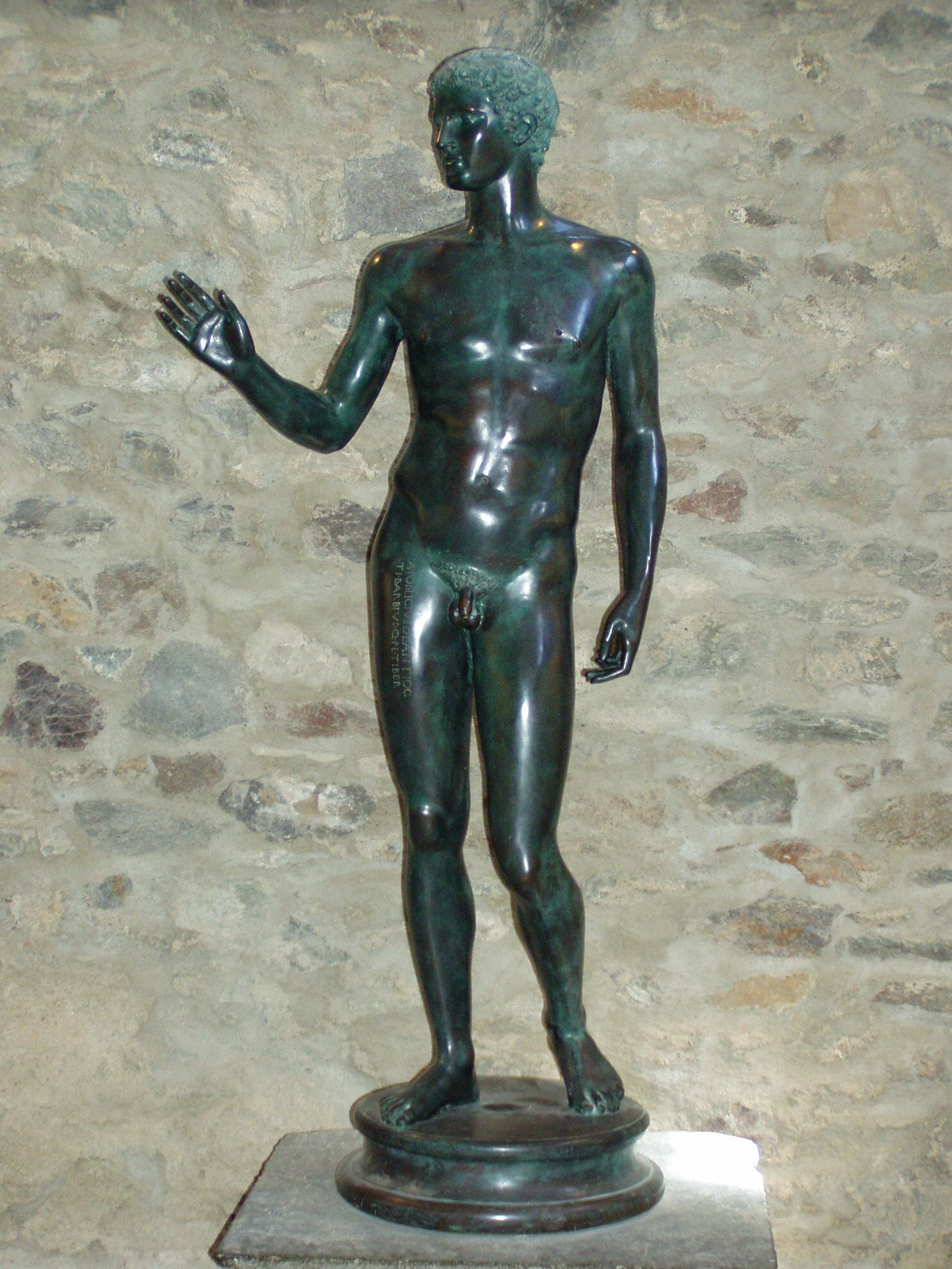 Jüngling vom Magdalensberg. Kopie einer römischen Bronzeplastik aus dem 1. Jh. v.Chr./Youth from the Magdalensberg. Copy of Roman Bronze statue dated to the 1st century B.C.